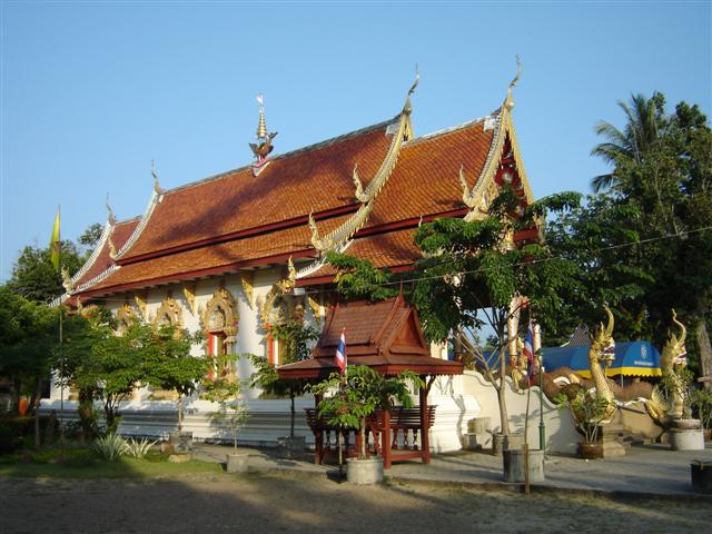 บริเวณวัด